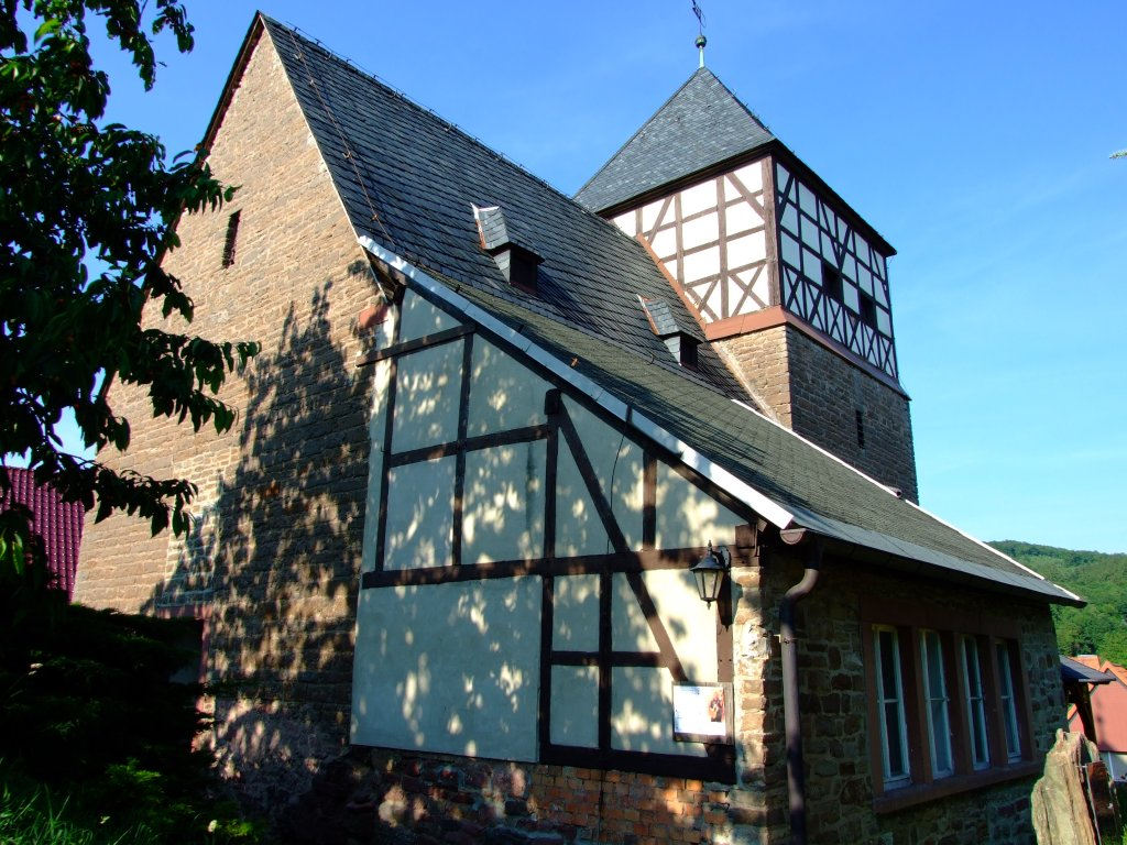 Kirche in Grillenberg